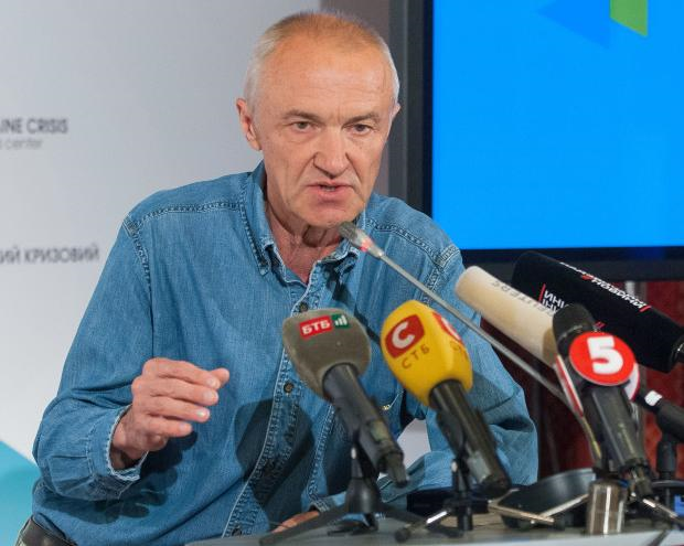 герман обухов